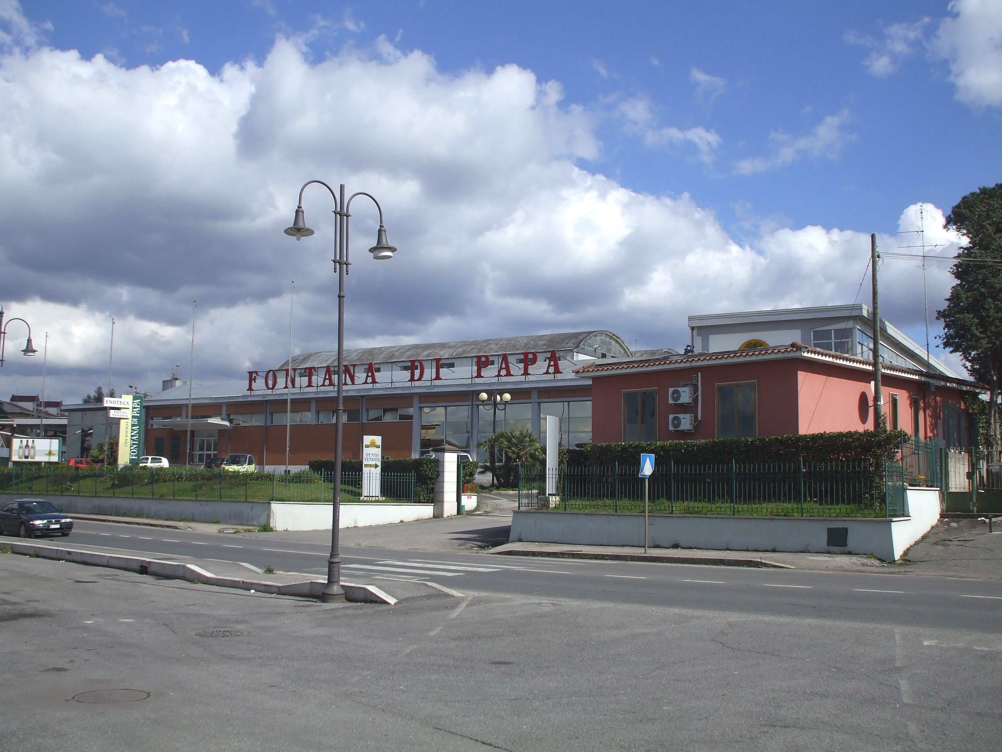 Cecchina Fontana di Papa cantina vitivinicola